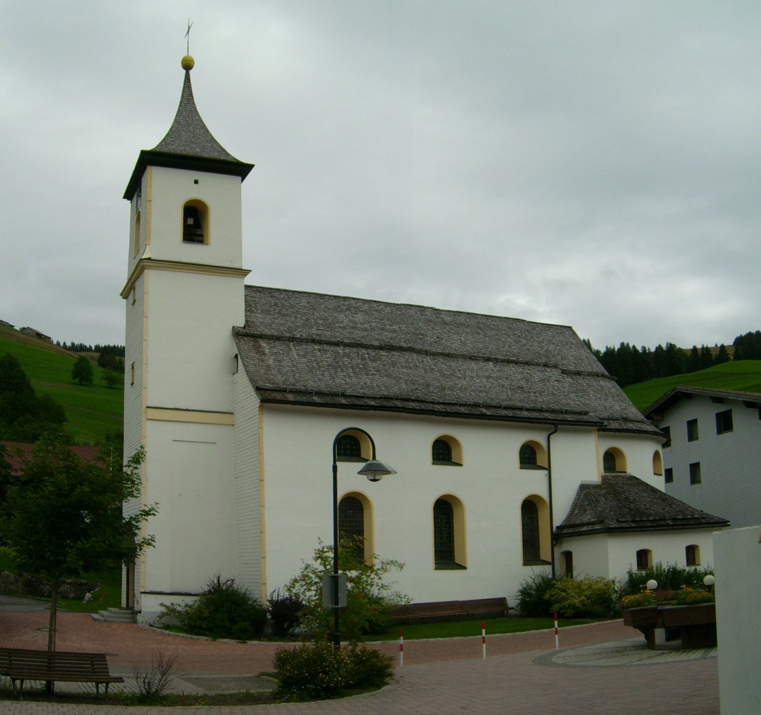 Kirchel Zöblen Österreich